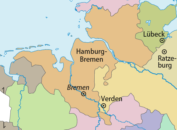 Erzbistum (Hamburg-)Bremen vor der Reformation